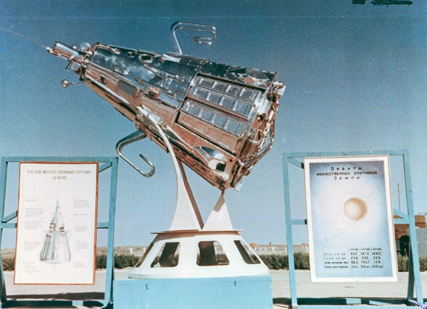 16 марта 1962 года Капустин Яр из ракетного полигона превратился в космодром. В тот день был осуществлен запуск спутника Космос-1. С космодрома Капустин Яр стартовали небольшие исследовательские спутники, для запуска которых использовались ракеты-носители небольшой мощности серии «Космос». На фото: Спутник-3